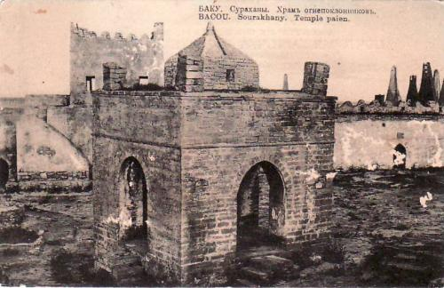 Ateshgah, beginning of 20th cent